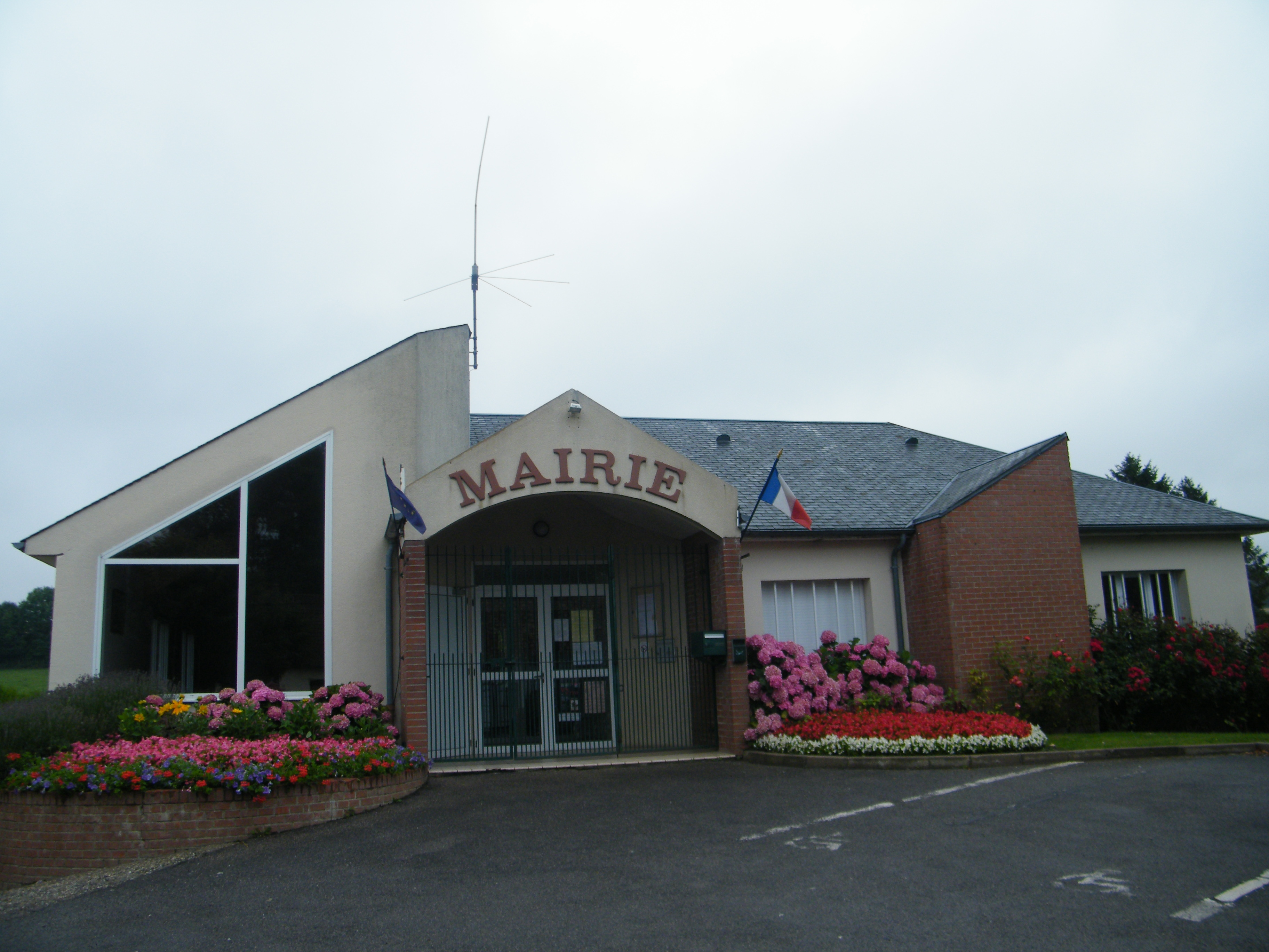 Mairie, rue du maréchal Leclerc, vers Argoules.